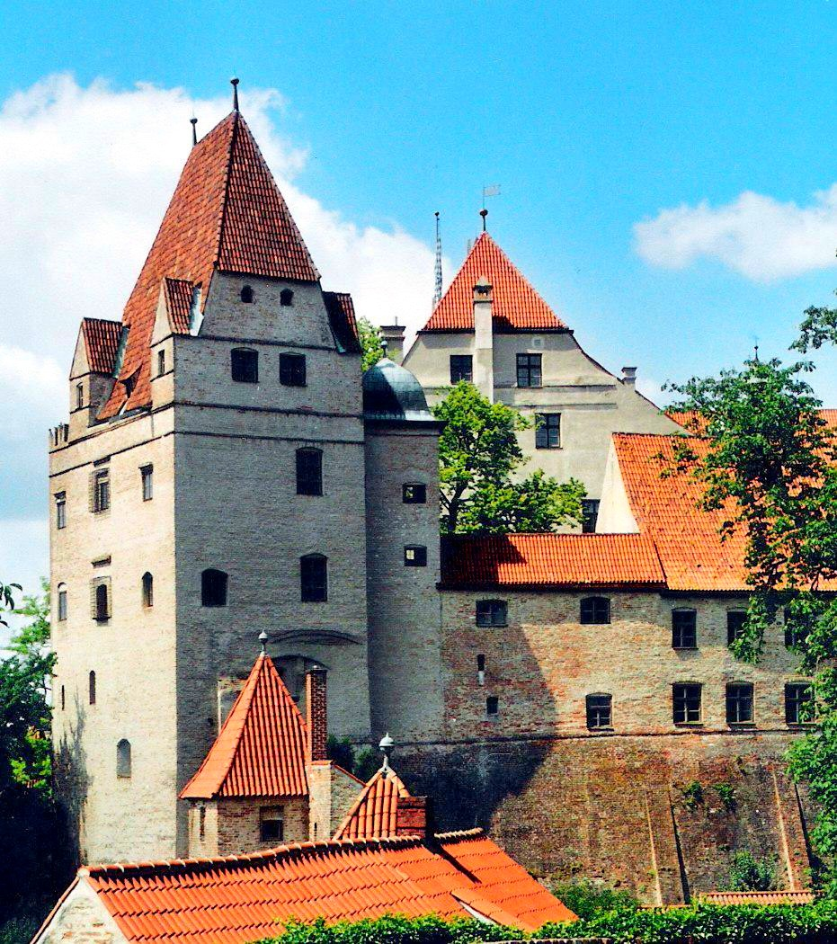 Die Anfänge der Burg gehen auf das Jahr 1150 zurück. Damals wurde eine Vorgängeranlage, möglicherweise ein einfaches Wehrhaus mit Palisadenzaun und hölzernen Turm, als Landeshuata (Landeshüter, Landesschutz) urkundlich erwähnt. Das war noch vor der Gründung der Stadt Landshut. Die Anlage war auch der Namensgeber der Stadt. Die ältesten Teile der heutigen Anlage stammen aus der Zeit um 1200, die Zeit, in der Herzog Ludwig der Kehlheimer die Stadt Landshut gründete. Fertiggestellt war die Burg um das Jahr 1235. Damals besuchte auch Kaiser Friedrich II die Stadt und die Burg. Die Herzöge von Bayern-Landshut erweiterten die Burg im 15. Jhd und nannten die Anlage in Trausnitz, was soviel heißt wie "Trau dich nicht", im 16. Jhd um. 1634, im Dreißigjährigen Krieg, wurde die Burg von den Schweden eingenommen und teilweise zerstört. Ab dem 18. Jhd diente die Anlage unter anderem als Kaserne, als Gefängnis, als kurfürstliche Rentamtsregister, Lazarett und Cholerahospital. König Ludwig II ließ die ab 1869 im Obergeschoss des Fürstenhauses prächtige und herrschaftliche Räume einrichten. Im Oktober 1961 brach im Fürstenhaus ein Feuer aus. Die Schäden waren verheerend: Alle Wandmalereien wurden zerstört. Ebenso die herrschaftlichen Räume von König Ludwig II. Erst 2011 wurde einer Räume wiederhergestellt und mit originalen Möbeln aus Herrenchiemsee ausgestattet. Die Burg gehört heute zu Bayrischen Schlösserverwaltung und kann besichtigt werden. Johannes Heribert Pohl